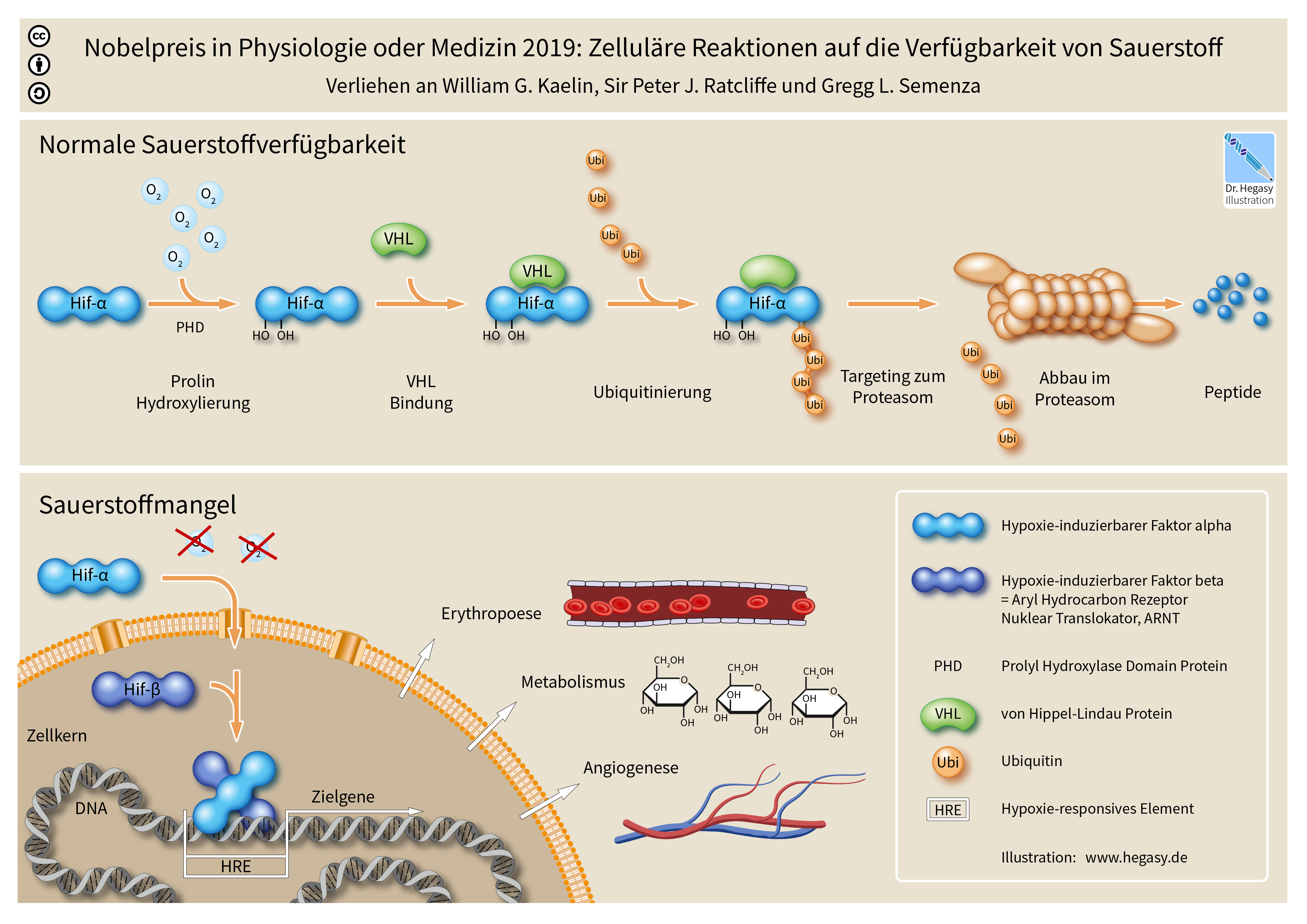 Nobelpreis für Physiologie oder Medizin 2019: Zelluläre Anpassungsmechanismen an die Verfügbarkeit von Sauerstoff. Bei normaler zellulärer Verfügbarkeit von Sauerstoff wird Hif-1 alpha an zwei Prolin-Resten hydroxyliert. Daraufhin assoziiert es mit VHL und wird mit Ubiquitin markiert. Hif-1 alpha wird dann im Proteasom abgebaut. Bei Sauerstoffmangel hingegen steht kein Sauerstoff zur Verfügung, um die Prolin-Reste zu hydroxylieren. Daraufhin transloziert Hif-1 alpha in den Zellkern, wo es an Hif-1 beta (auch ARNT genannt) assoziiert. Dieser Komplex bindet an die DNA-Region HRF (Hypoxie responsives Element), woraufhin die zugehörigen Gene abgelesen werden. Diese sind an der Regulation einer Vielzahl von Prozessen beteiligt, so der Erythropoese, der Glykolyse und der Angiogenese.